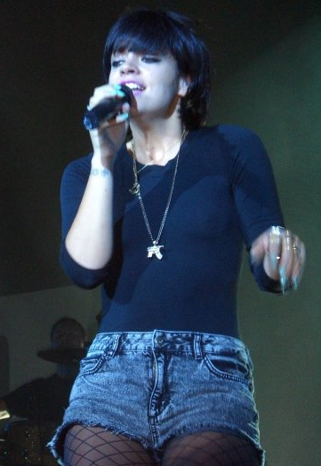 Lily Allen sur la scène de La Cigale à Paris le 6 mai 2009.